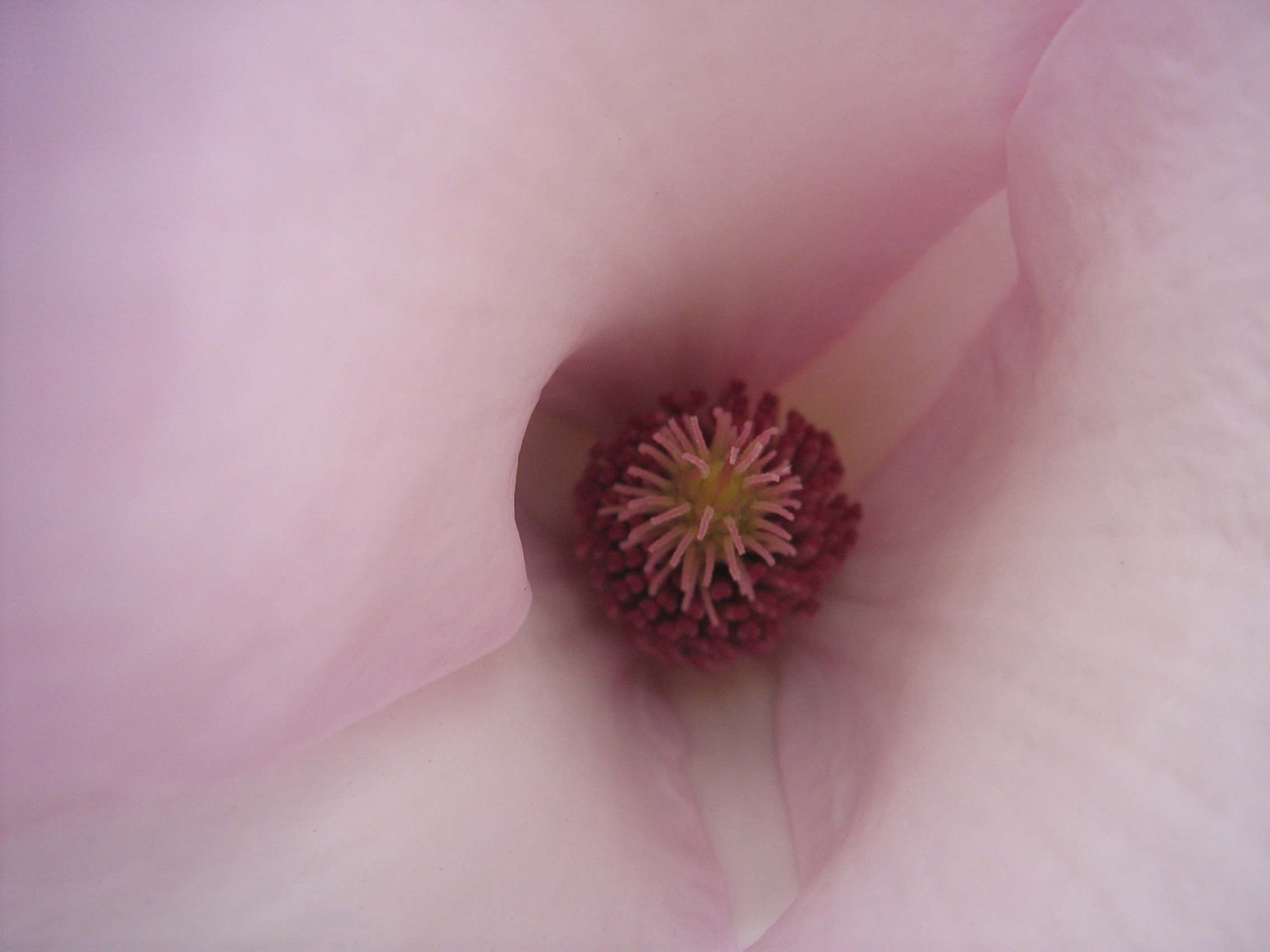 Магнолія Суланжа "Александріна" в Національному ботанічному саду імені Миколи Гришка НАН України.